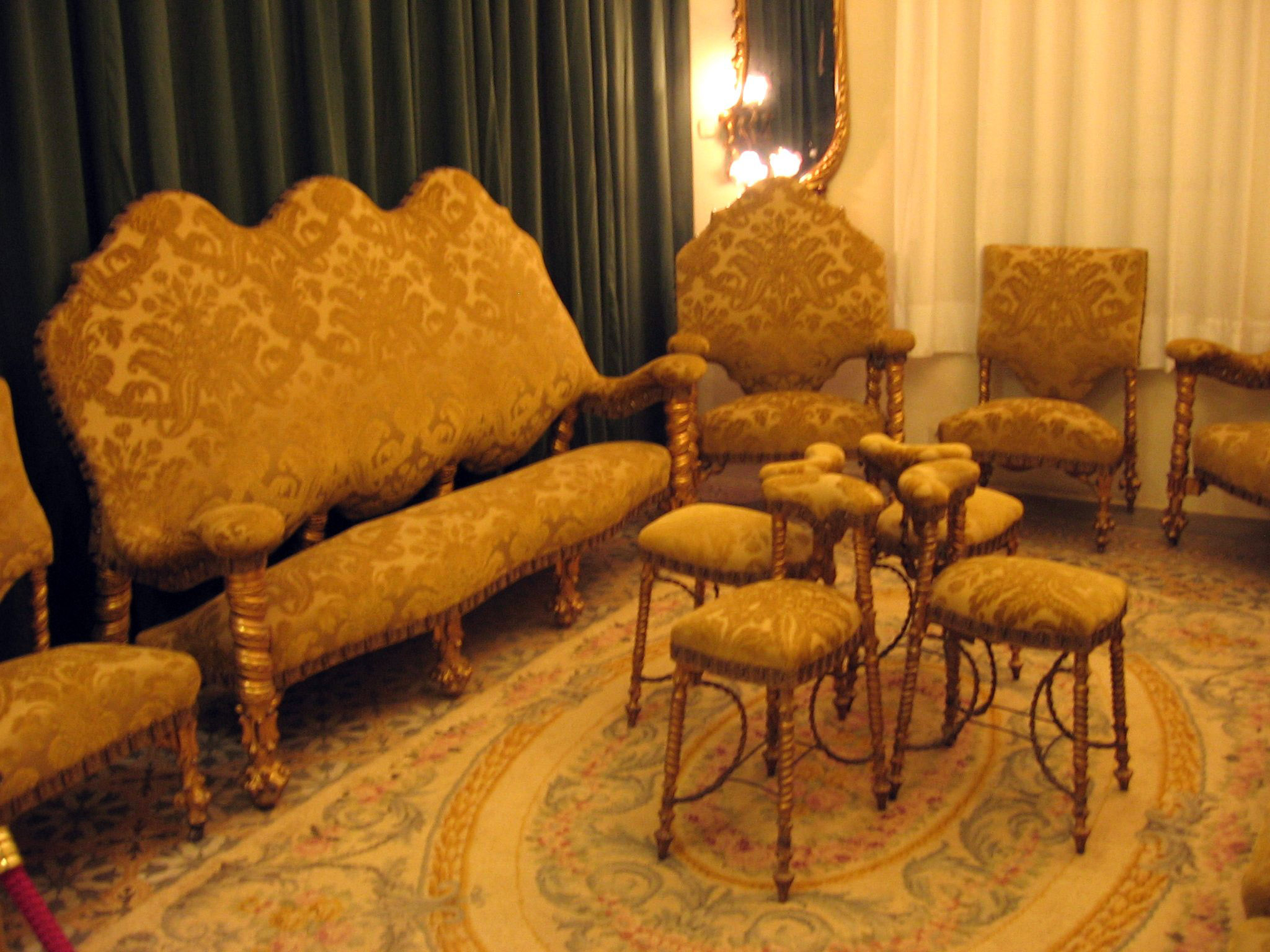 Salón de la Casa Calvet, Casa-Museo Gaudí, Parque Güell, Barcelona.